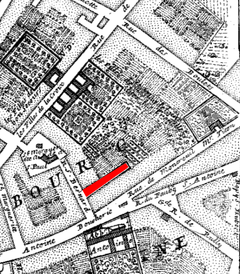 Map of Paris in 1705. Huitième plan de Paris divisé en ses vingts quartiers [Image fixe numérisée] / par N. de Fer Publication : Paris, 1705 Description matérielle : 1 carte ; 44,5 x 54,5 cm Collection : Collection d'Anville ; 00808 Note(s) : Cote : Ge DD 2987 (808) BNF Richelieu Cartes et Plans Reprod. 85 C 125661 ; Reprod. Sc 87/660 . - Légende et description en marge gauche et droite. Carte "pour servir au traité de la Police par M.L.C.D.L.M. Traité de la Police p. 87" Sujet(s) : Paris (France) -- Quartiers anciens Notice n° : FRBNF38638263